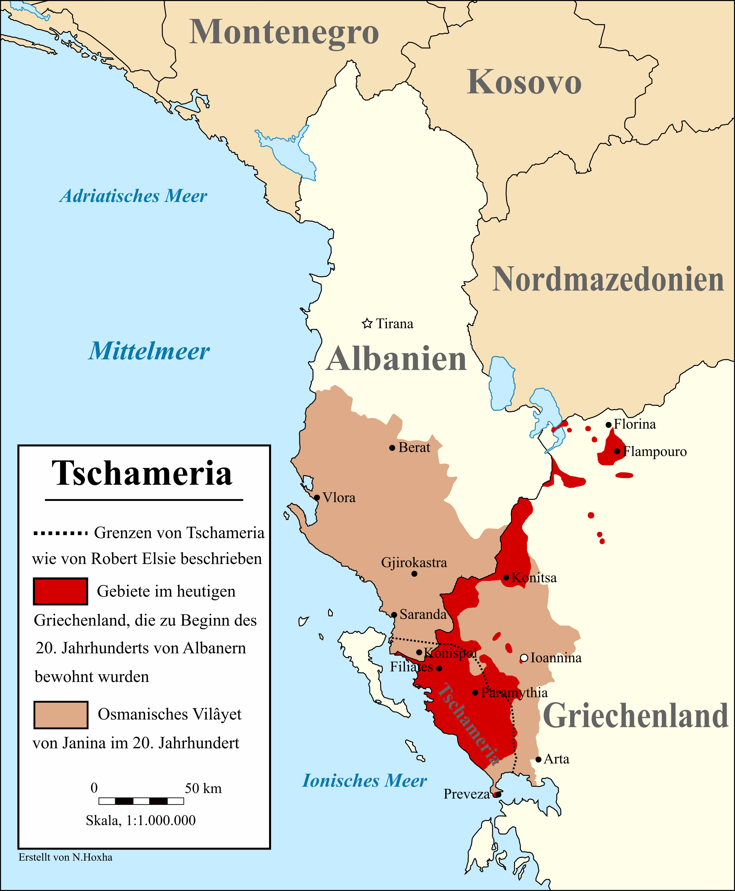 Die Karte zeigt die Umrisse der historischen Region von Chameria, wie von Robert Elsie beschrieben. Die Karte zeigt auch das osmanische Vilayet von Janina und die ungefähren Gebiete im heutigen Griechenland mit hohen Konzentrationen an Albanern im frühen 20. Jahrhundert.